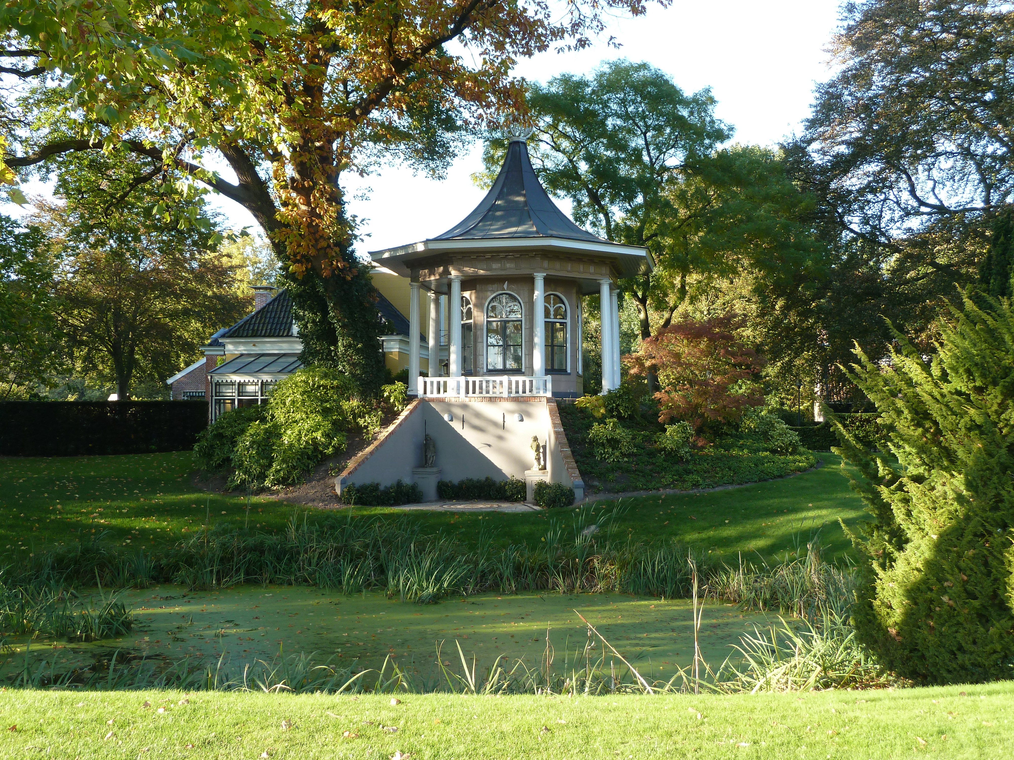 Theekoepel van het voormalige landgoed Oude Werf (De Burcht) in Bovenburen in Winschoten. Gebouwd in opdracht van B. (Berend?) Haitzema Viëtor, waarschijnlijk kort nadat hij het landgoed in 1831 kocht. In 1966 gerestaureerd door architect Pieter L. de Vrieze.